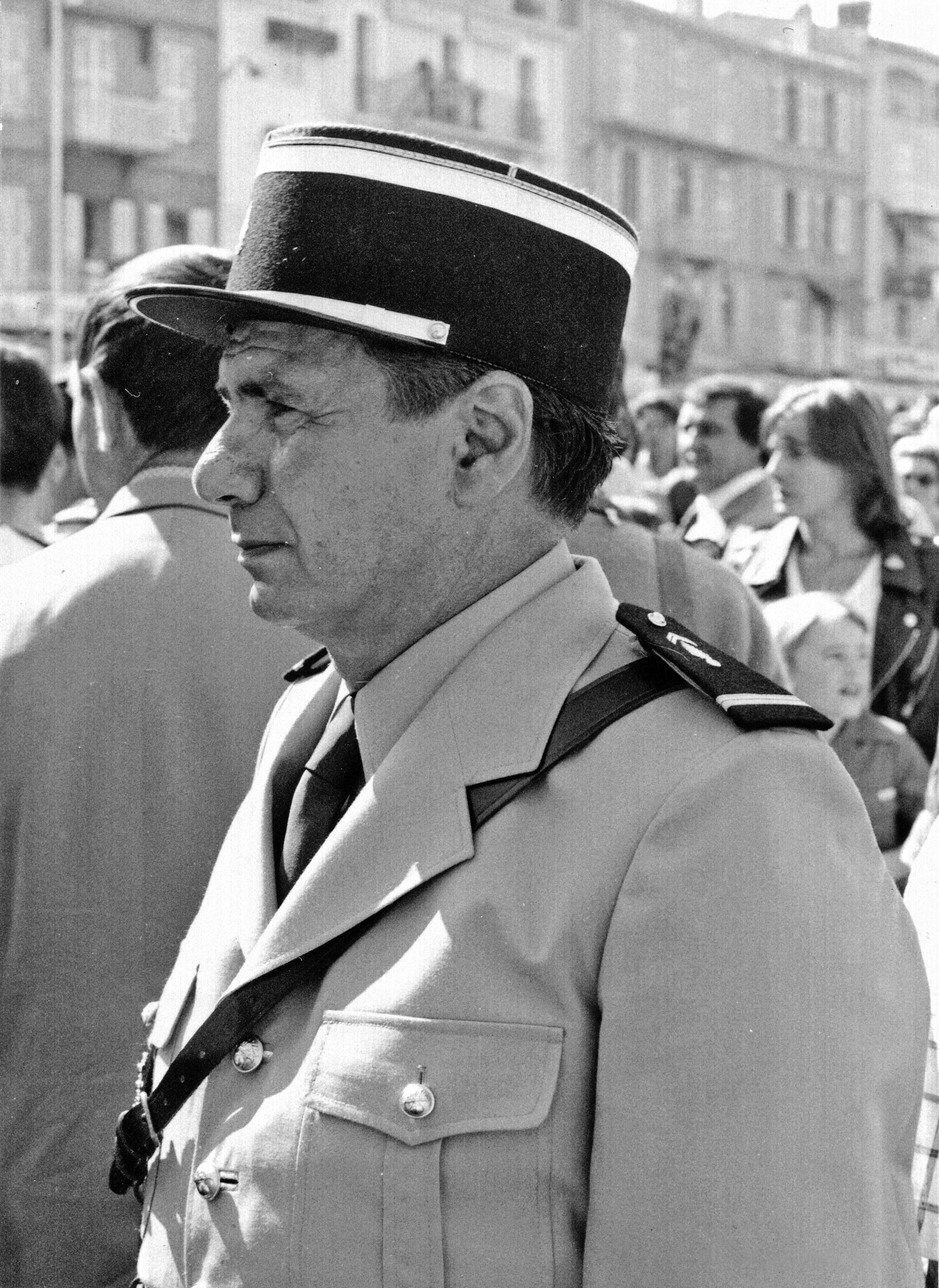 L'acteur Michel Galabru lors du tournage du film Le Gendarme et les Extra-terrestres en 1978, à Saint Tropez.